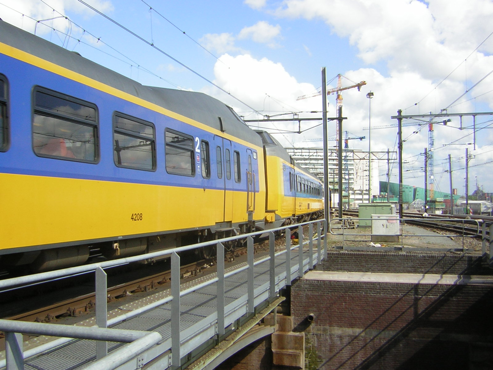 Enkele Koplopers vertrekken van Amsterdam naar Maastricht.